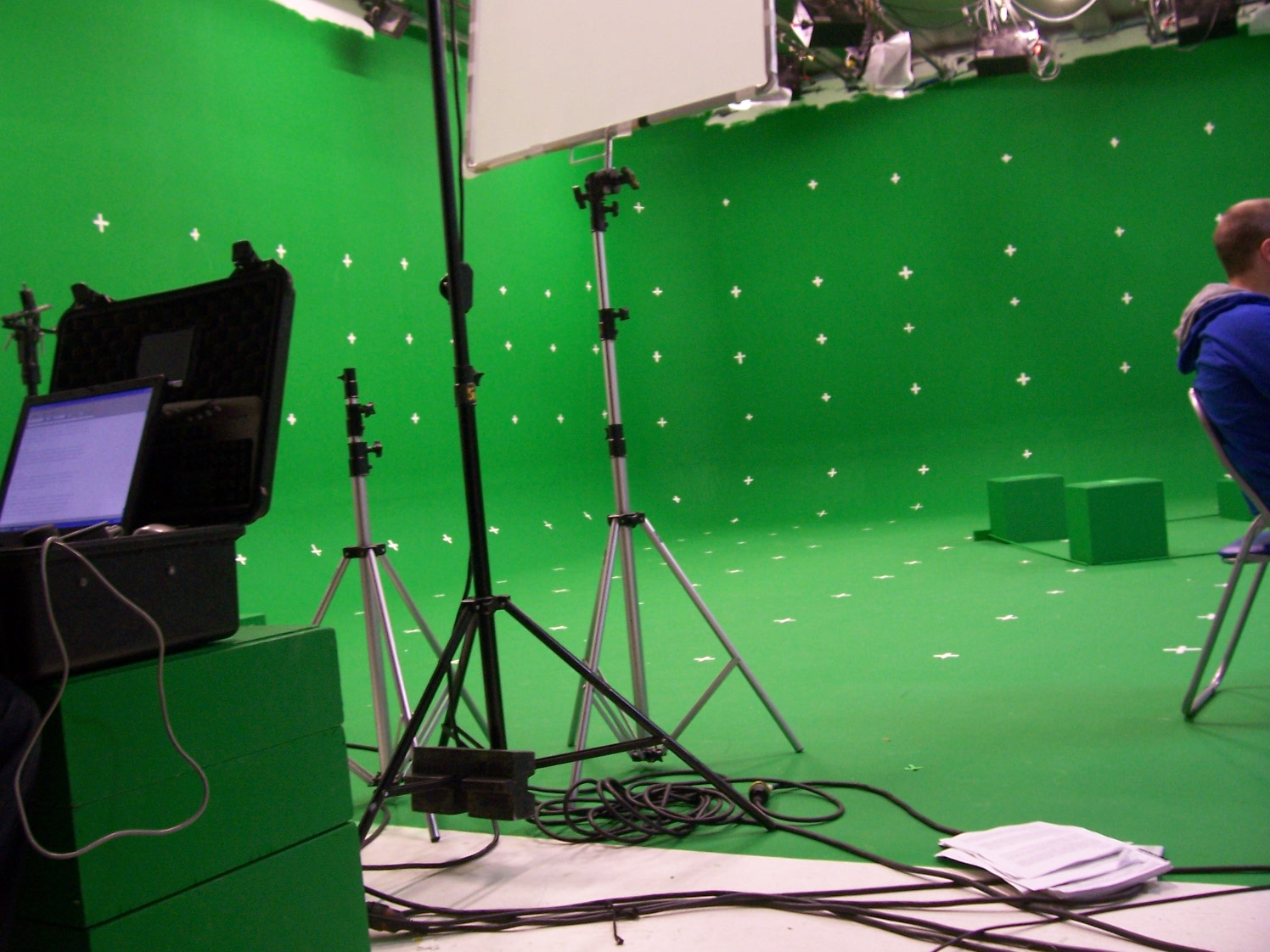 Le fond vert d'un studio de tournage recouvert de croix blanches réalisées au gaffer, permettant d'effectuer des mouvements de caméra qui pourront être trackés ensuite.